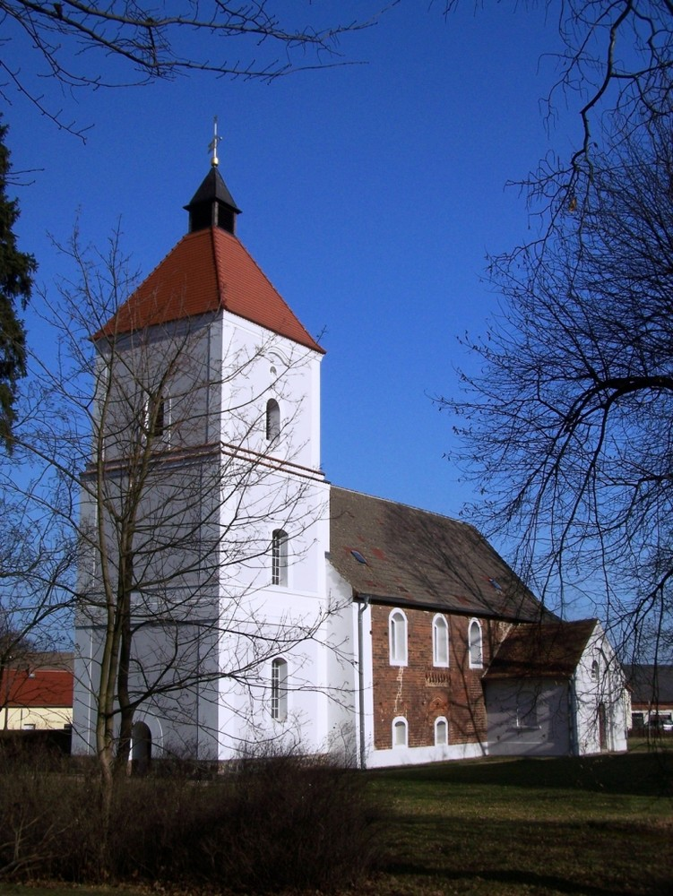 Dorfkirche in Klein Döbbern